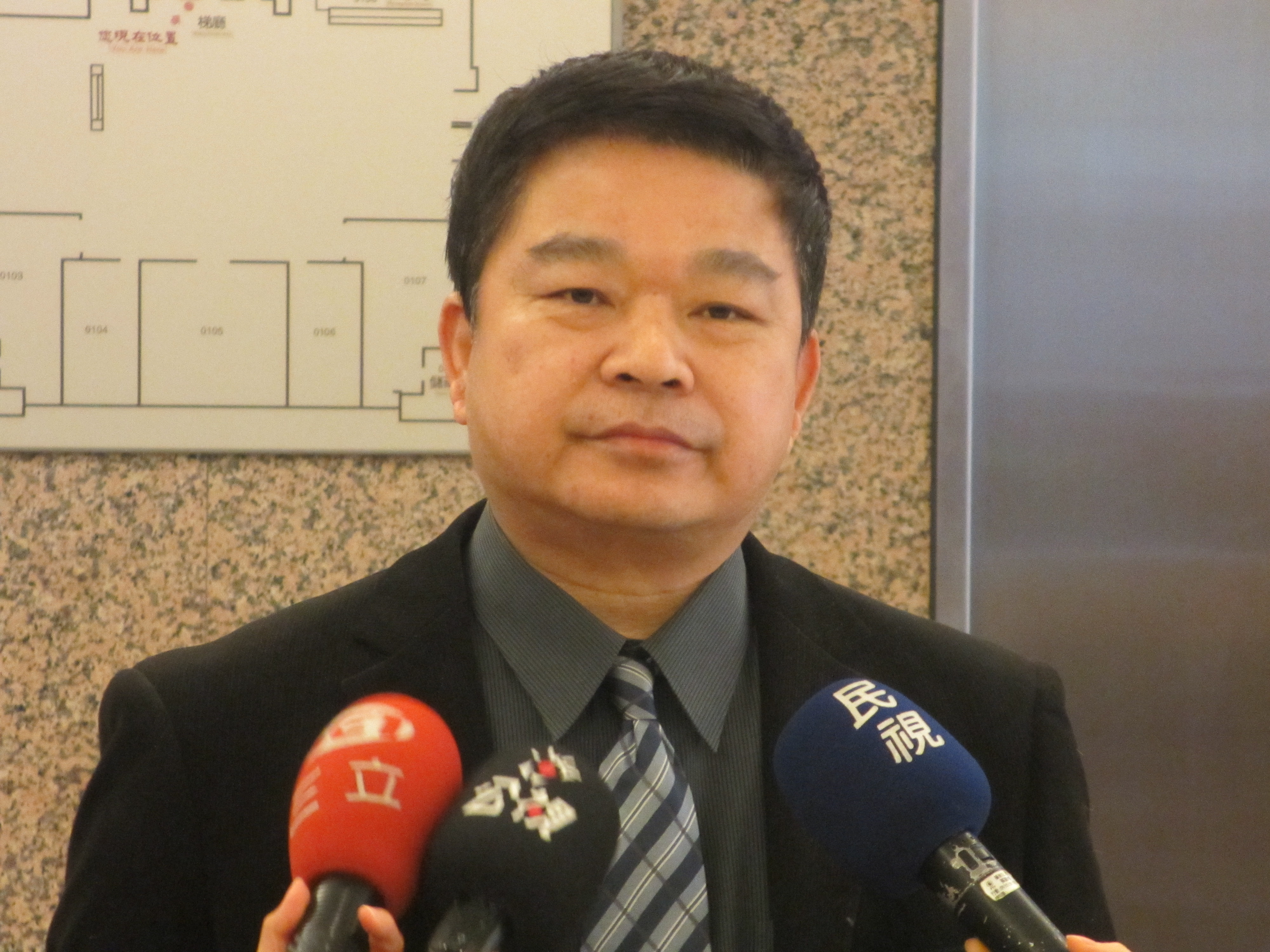 中文（台灣）: 台灣在野黨民進黨立委蔡煌瑯